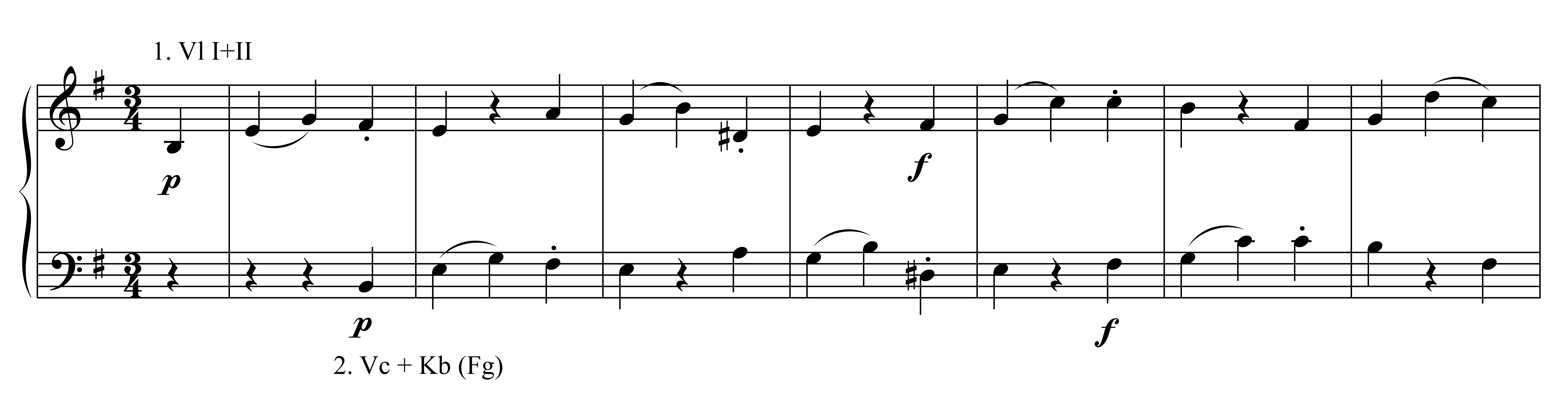 Notenbeispiel Haydn Sinfonie 44 - 2.Satz T. 1-7